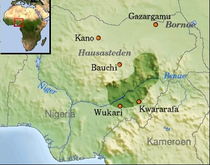 Kaart ligging historisch Kwararafa in Nigeria met nederlands opschrift